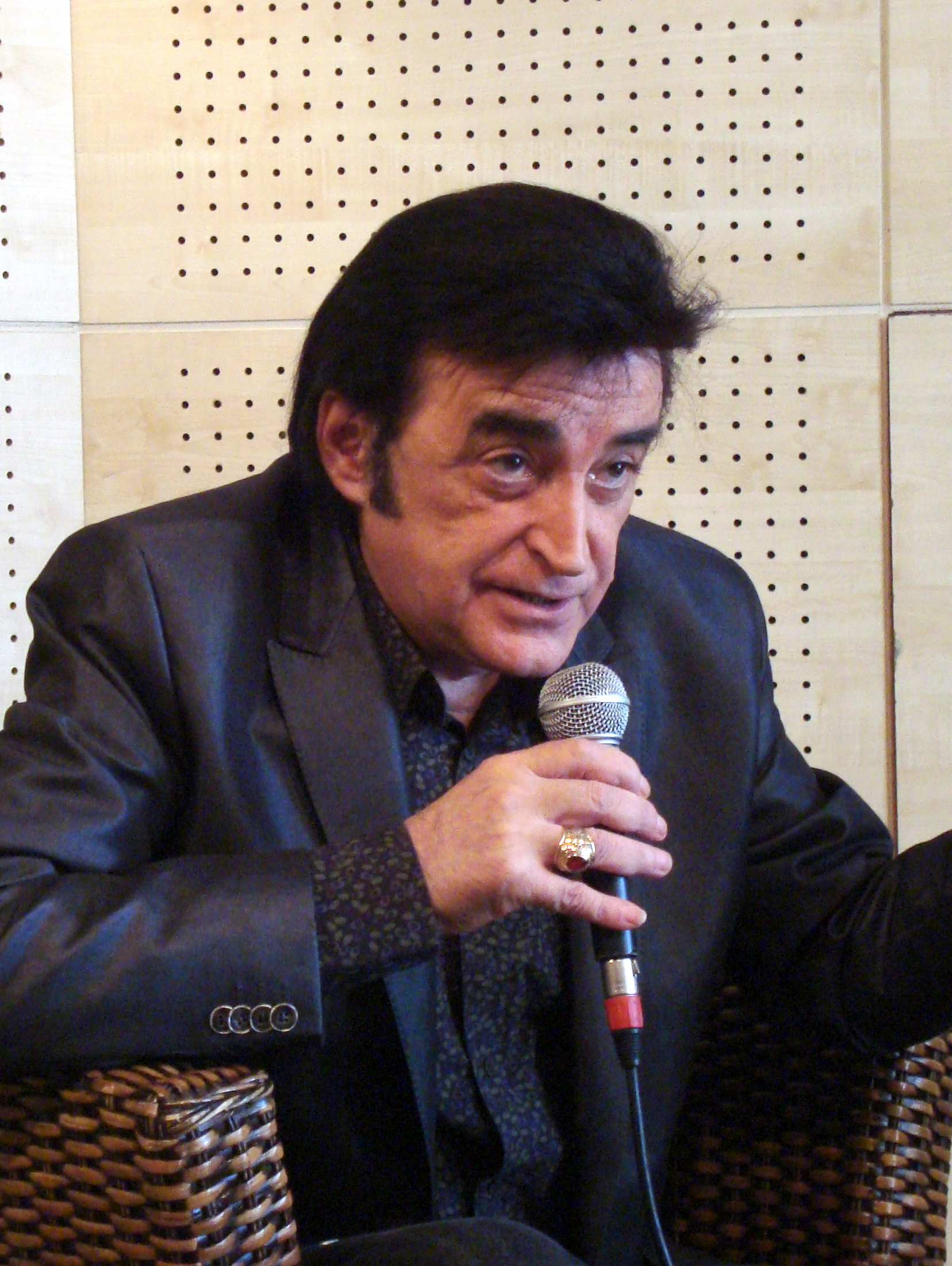 Interview de Dick Rivers à la Fnac de Paris, photo prise par Bemelmans Michaël.